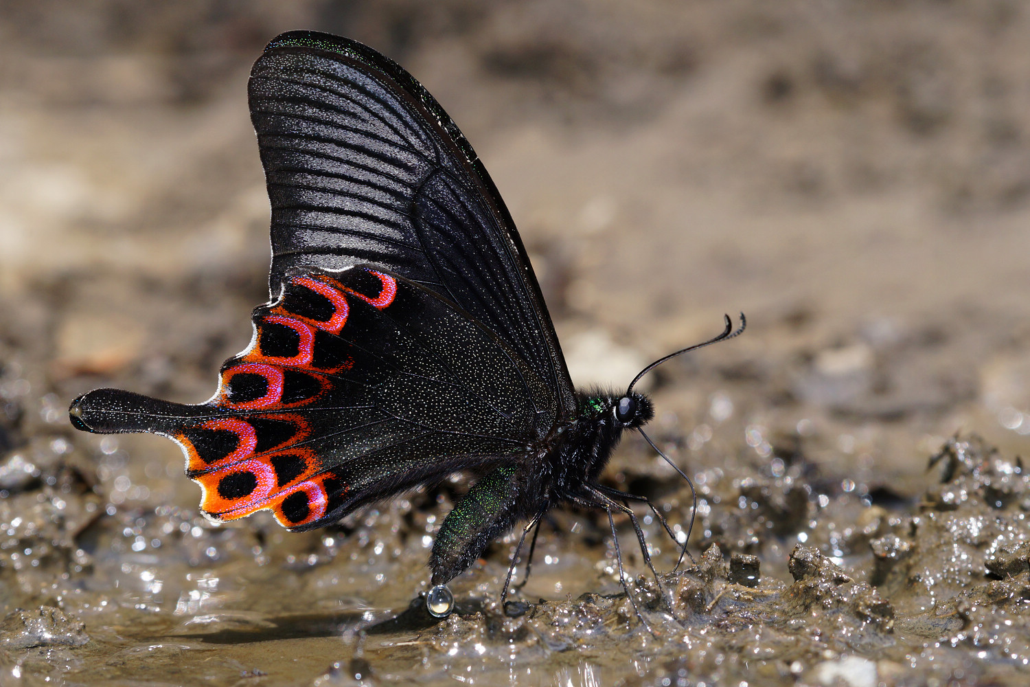 雙環翠鳳蝶（雙環鳳蝶、北埔鳳蝶、重幃翠鳳蝶 ；Papilio hopponis Matsumura, 1907）